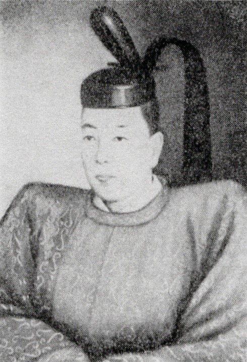 安中藩主、挙母藩主・内藤政苗の肖像画。